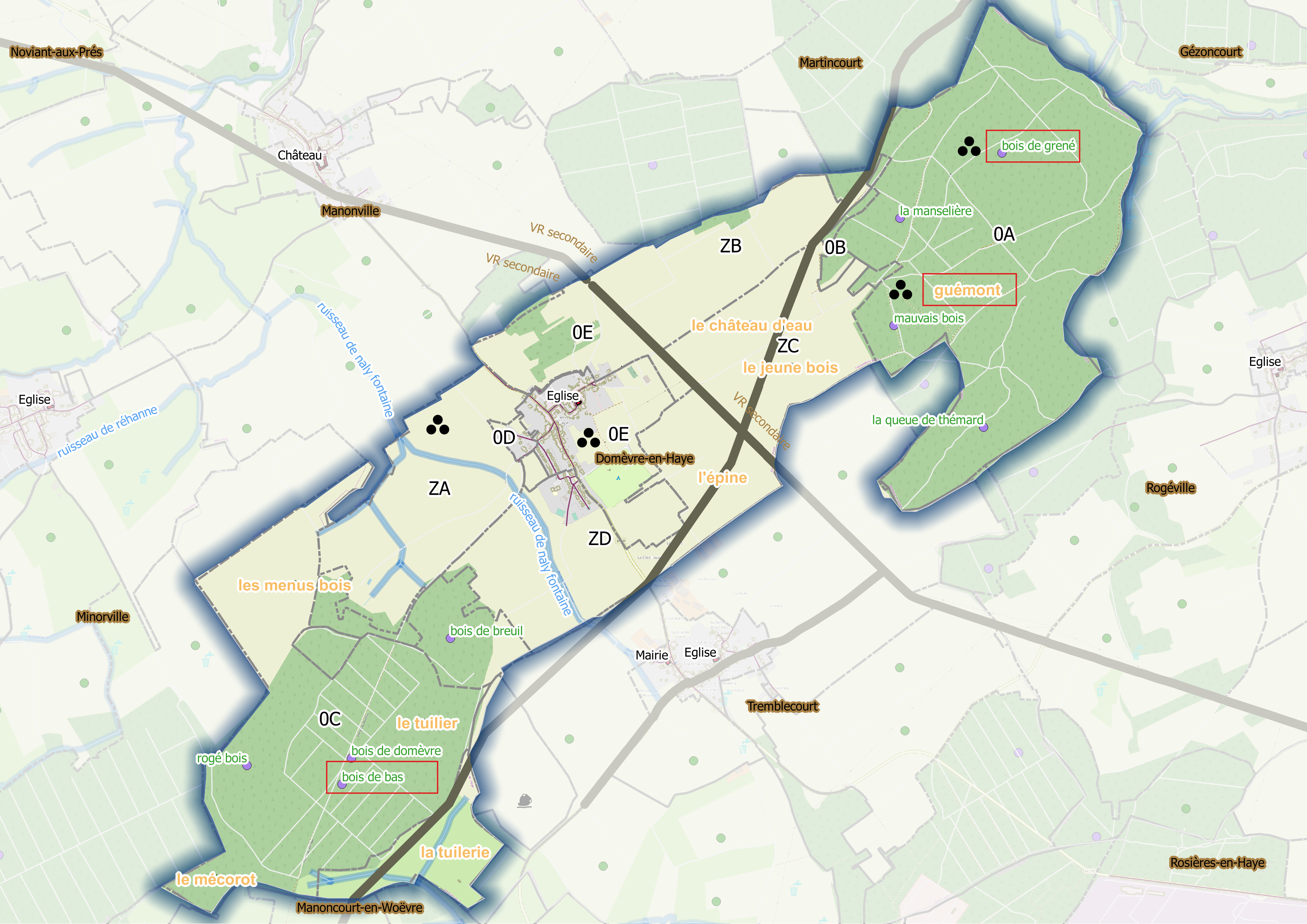 Fig1 - Domevre (ban communal) OSM et Qgis